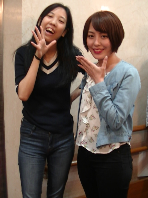 ぷらんくしょん (2019年5月当時)